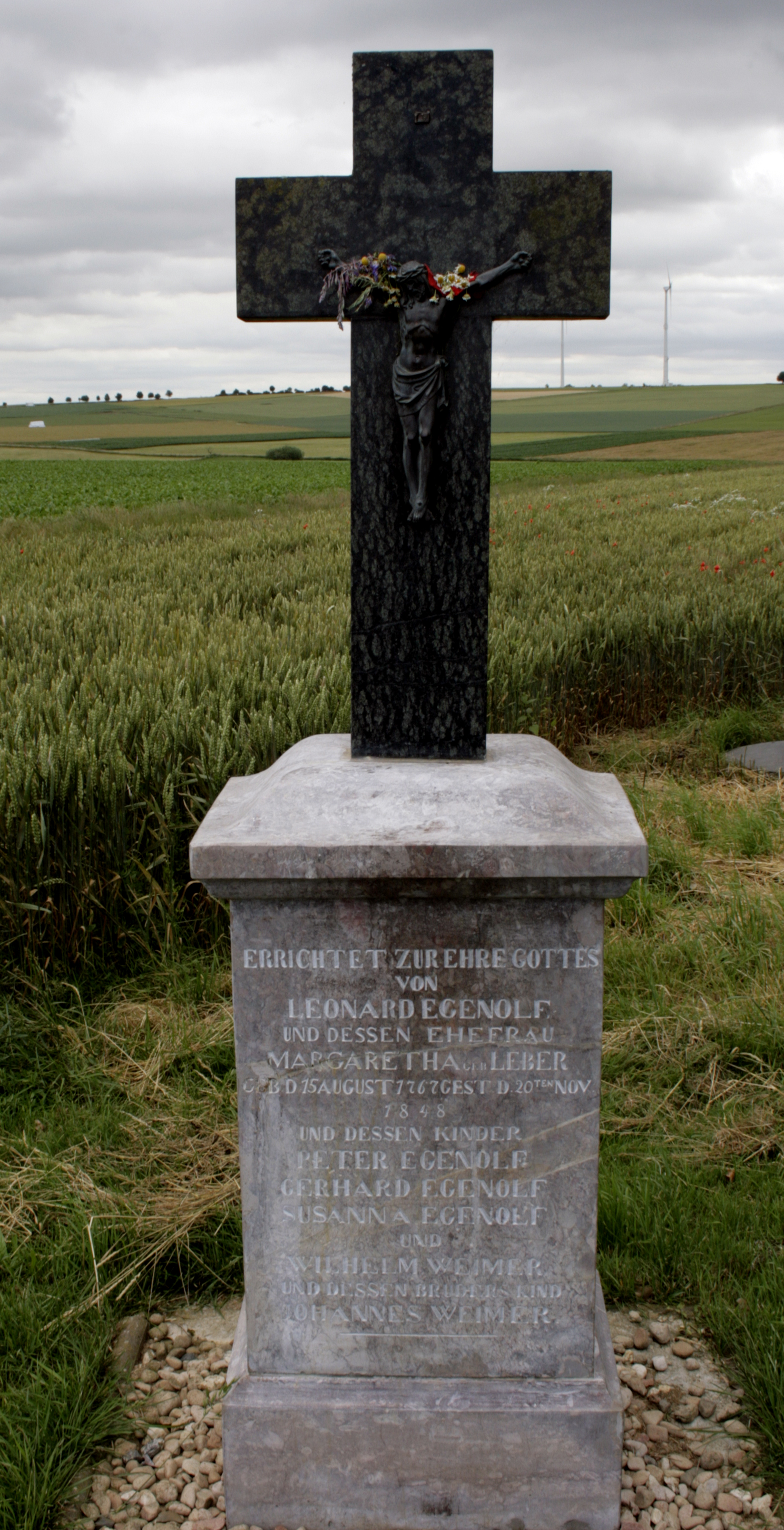 Feldkreuz am Weg zum Urselthaler Hof bei Limburg-Ahlbach, Deutschland